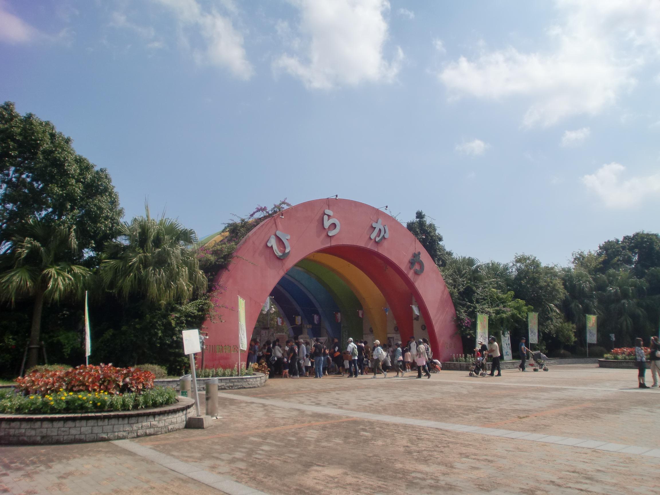 鹿児島市平川動物公園の入場ゲート。